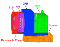 Quelle